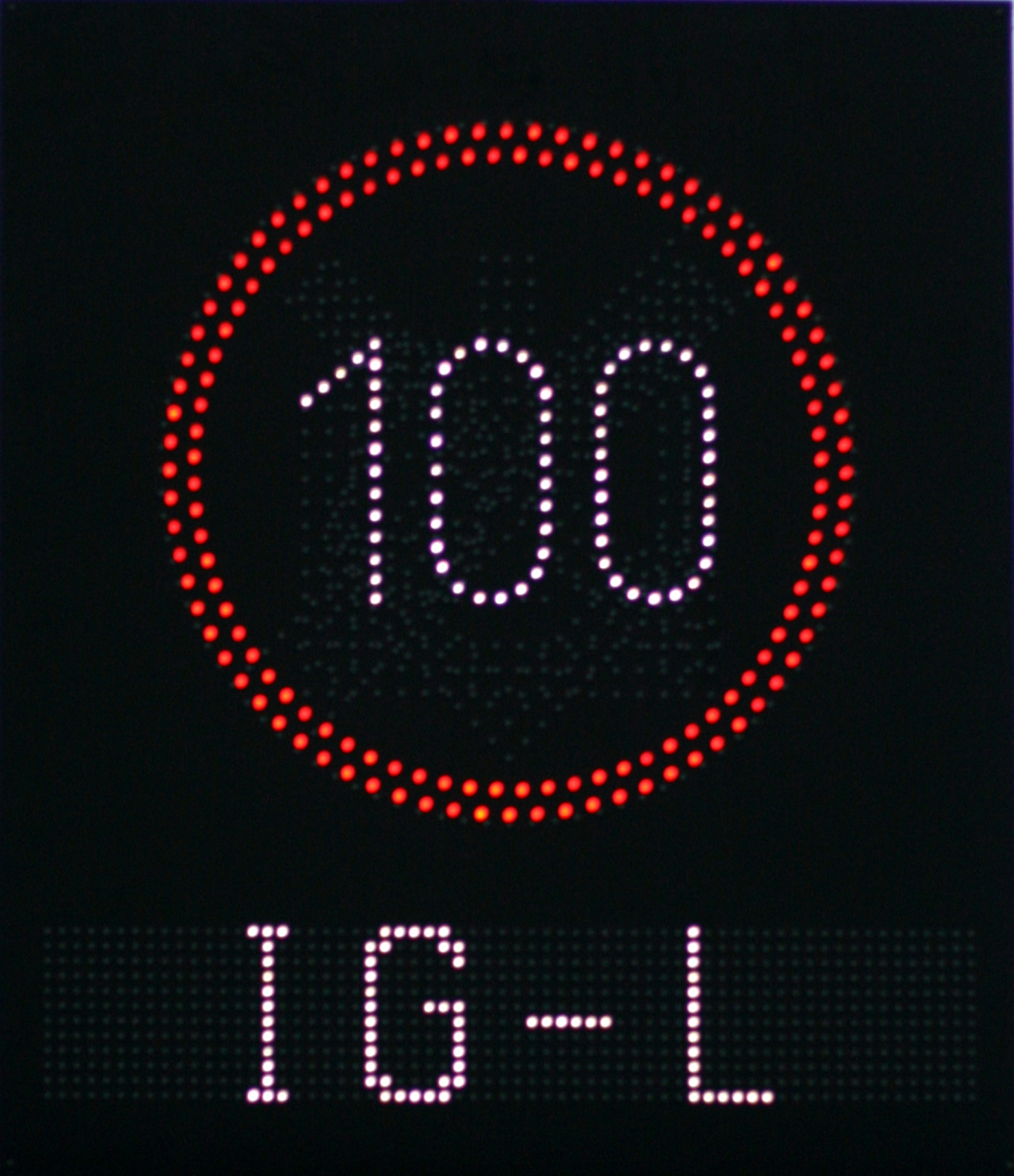 Verkehrsbeeinflussungsanlage Anzeige mit Geschwindigkeitsbeschränking 100 Immissionsschutzgesetz-Luft (IG-L)